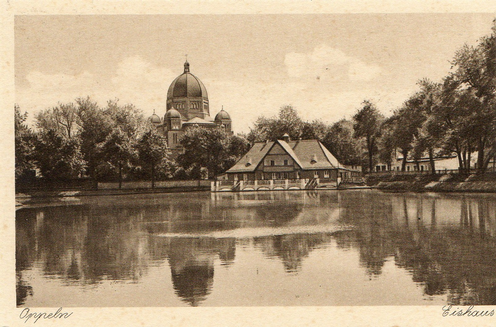 Synagoge